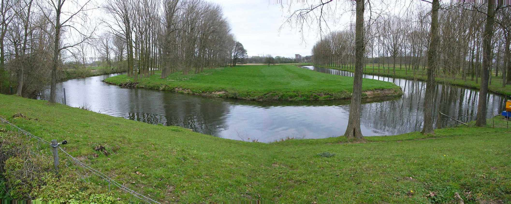 river Roer near Roerdalen-Lerop (NL)